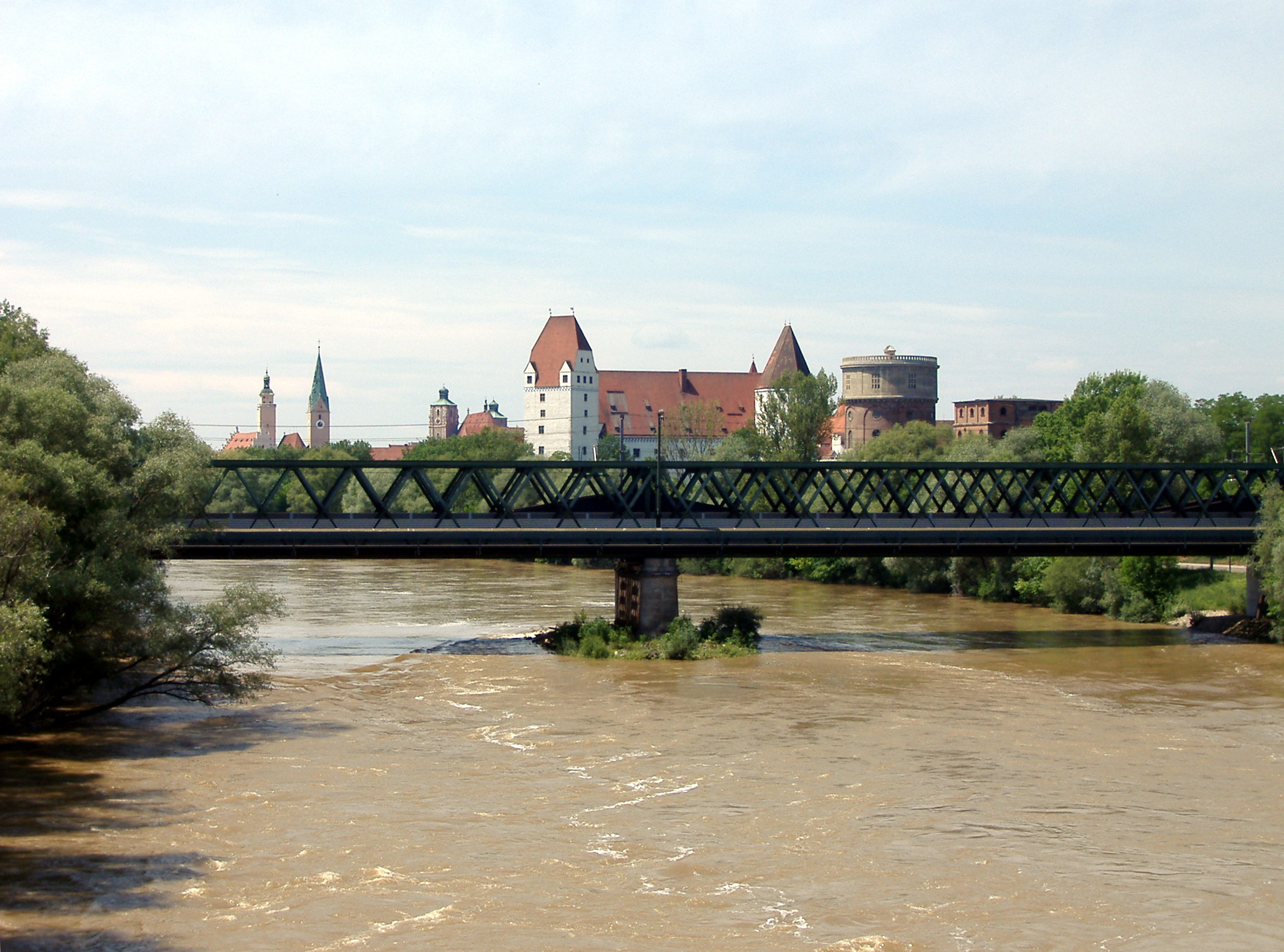 Blick von der Schillerbrücke aus auf die Altstadt von Ingolstadt